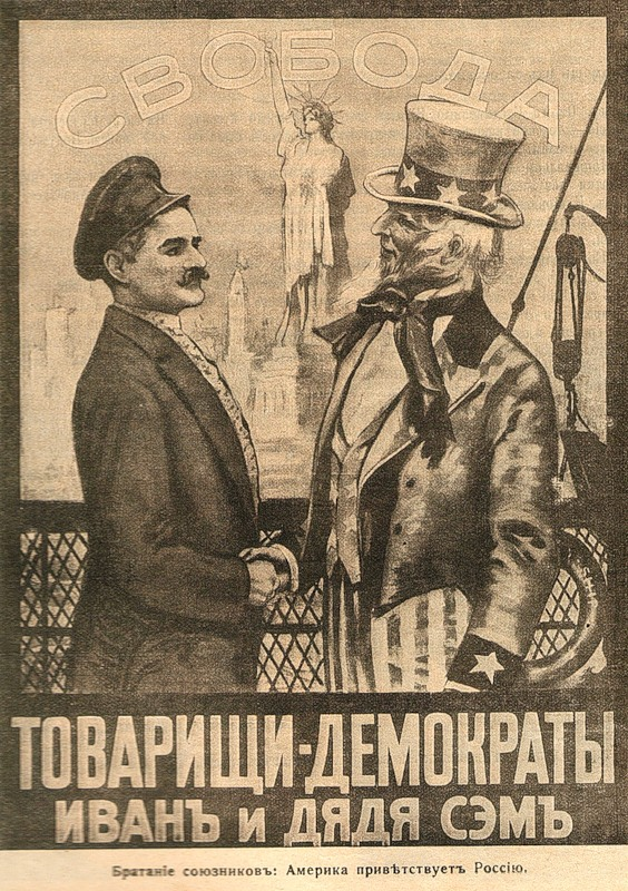 old russian poster depicting Uncle Sam shaking hands with representative of russian democracy